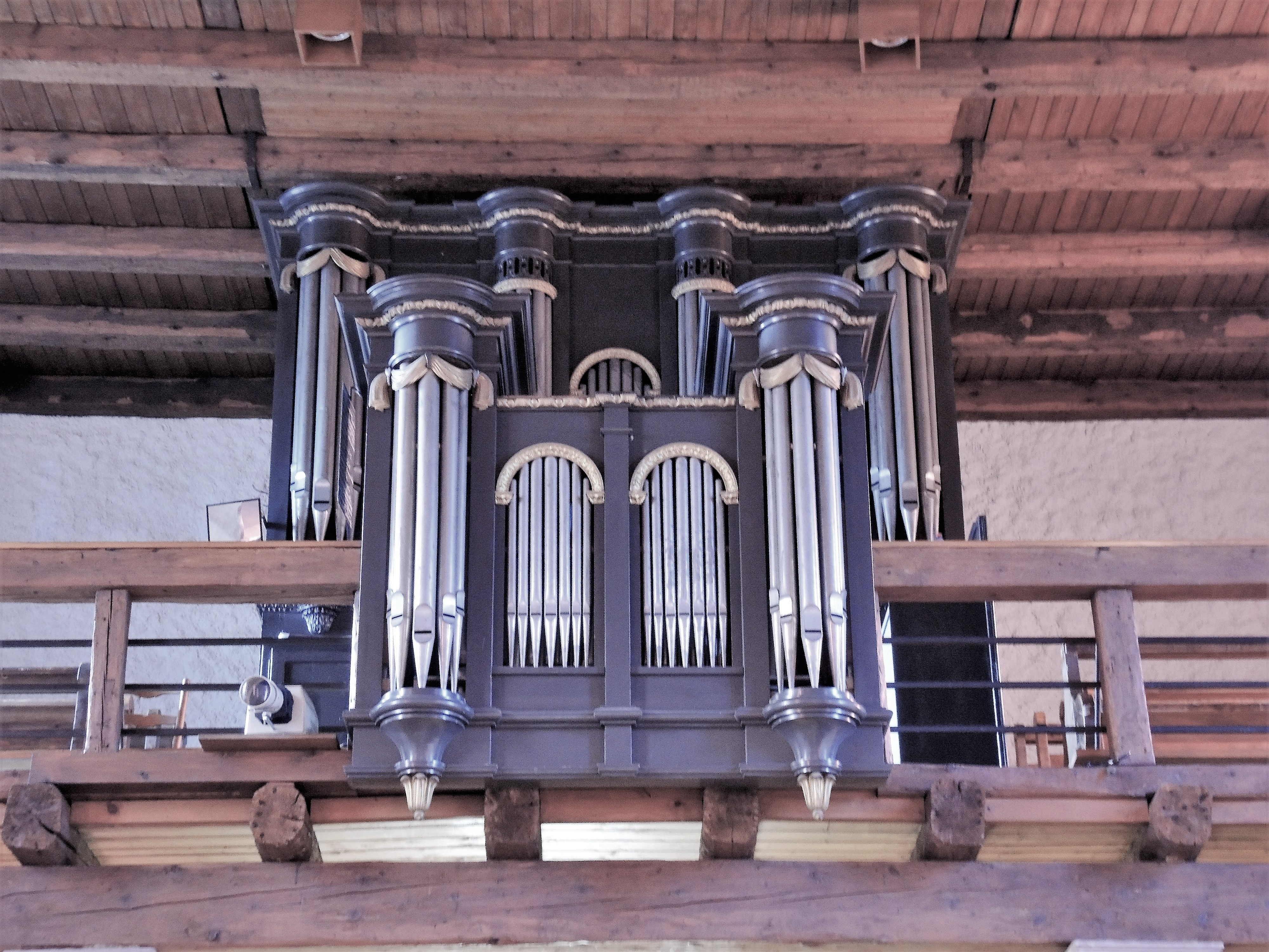 Orgue Rickenbach de 1845, dans l'église de Kirchberg. Haut-Rhin.